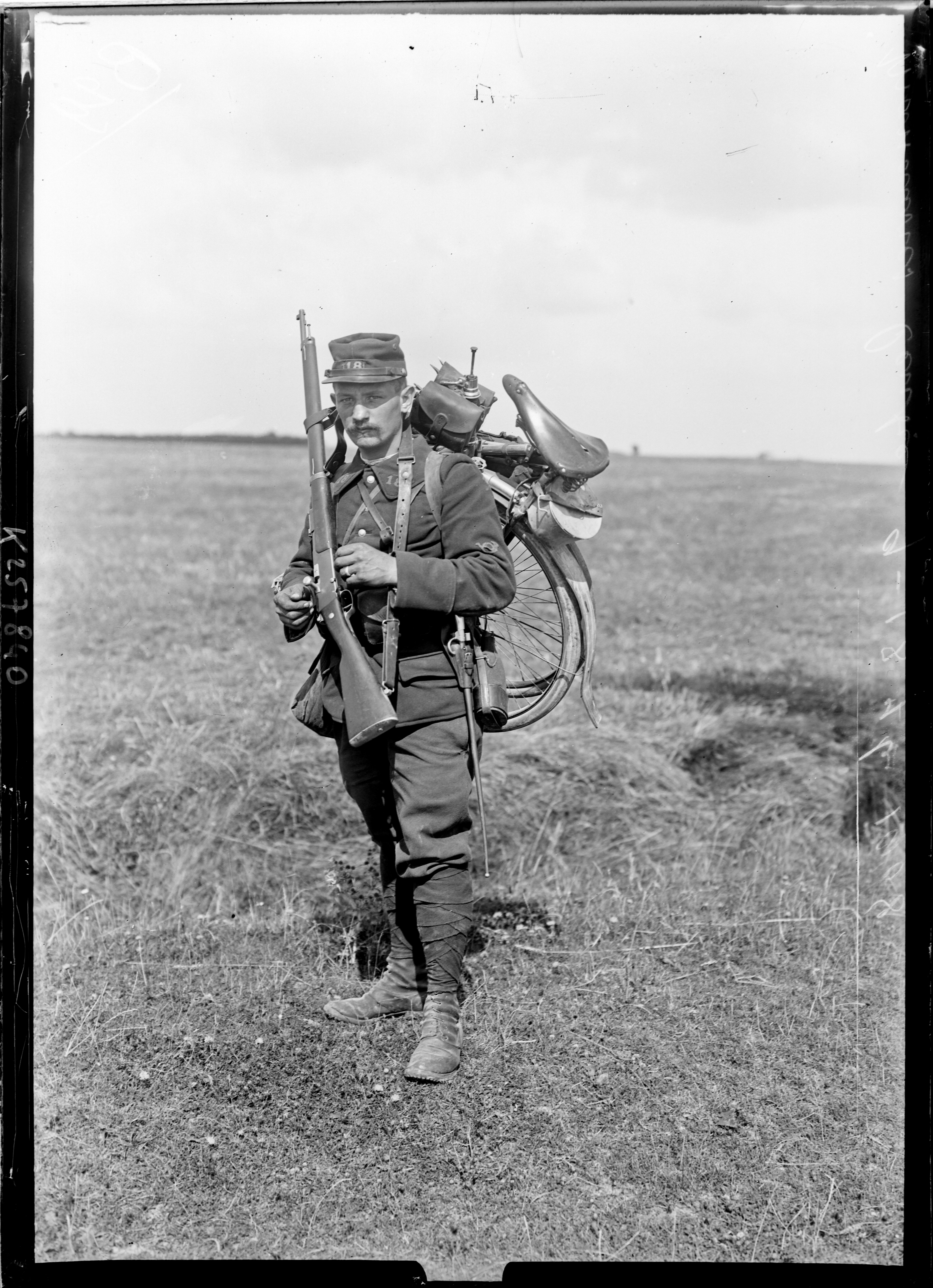 Manoeuvres [du] Centre, 9 - 18 septembre 1908 [cycliste du 18e chasseurs] : [photographie de presse] / [Agence Rol]